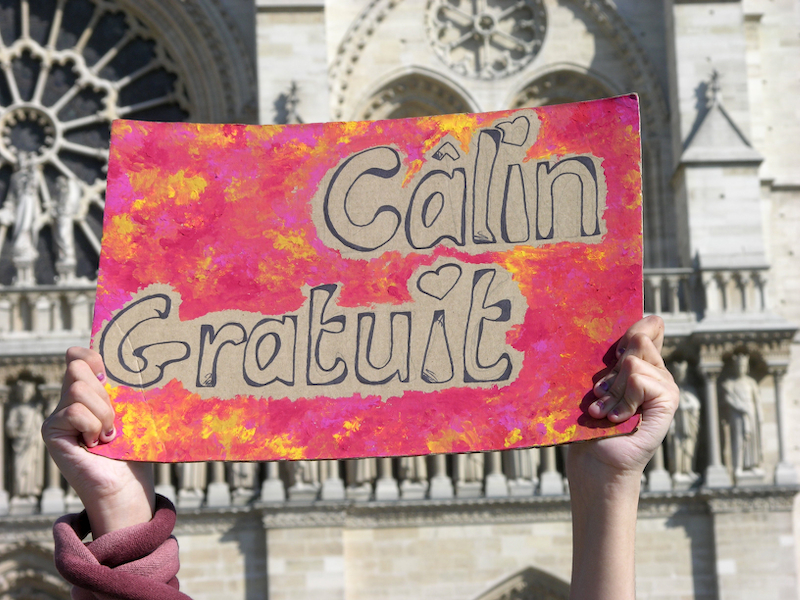 pancarte "Câlin gratuit" sur le parvis de Notre-Dame de Paris, France.Version française du free hug